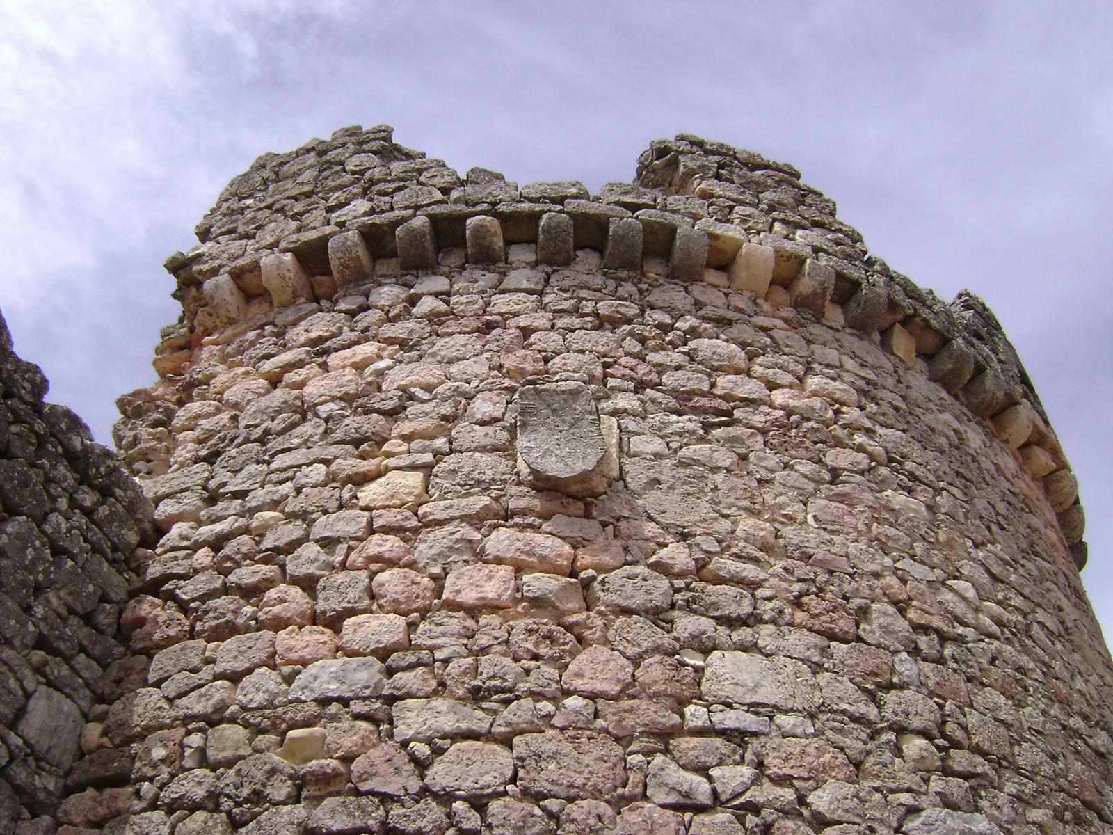 Escudo en el que se esboza el emblema de la familia Mendoza